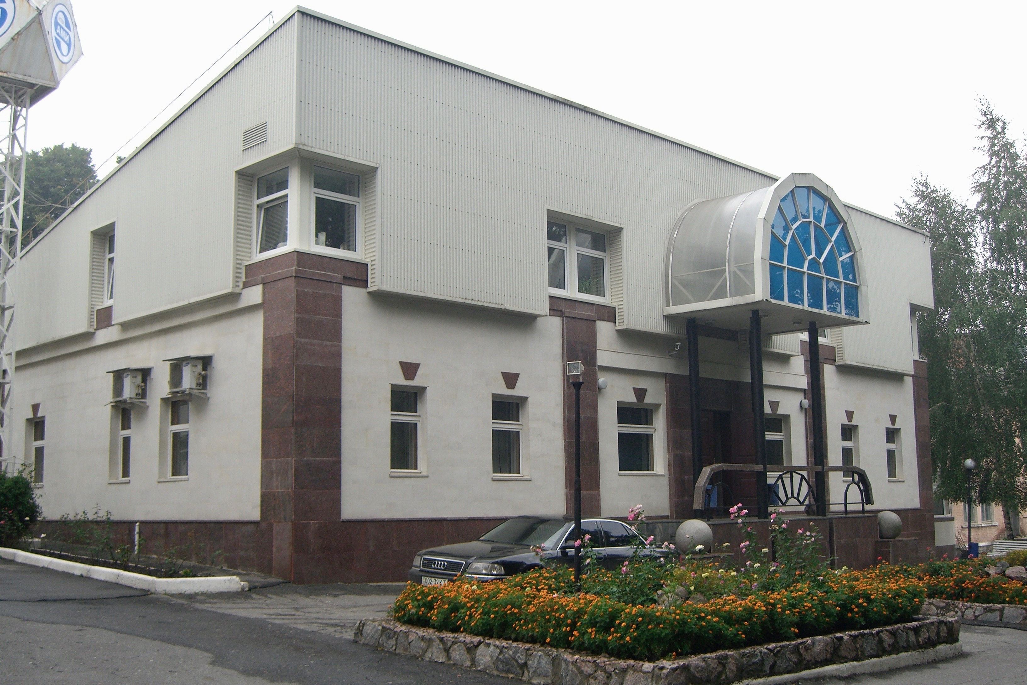 Офісний центр ІнтерАМІ (Харків, Сокольники, вул. Професорська, 30)